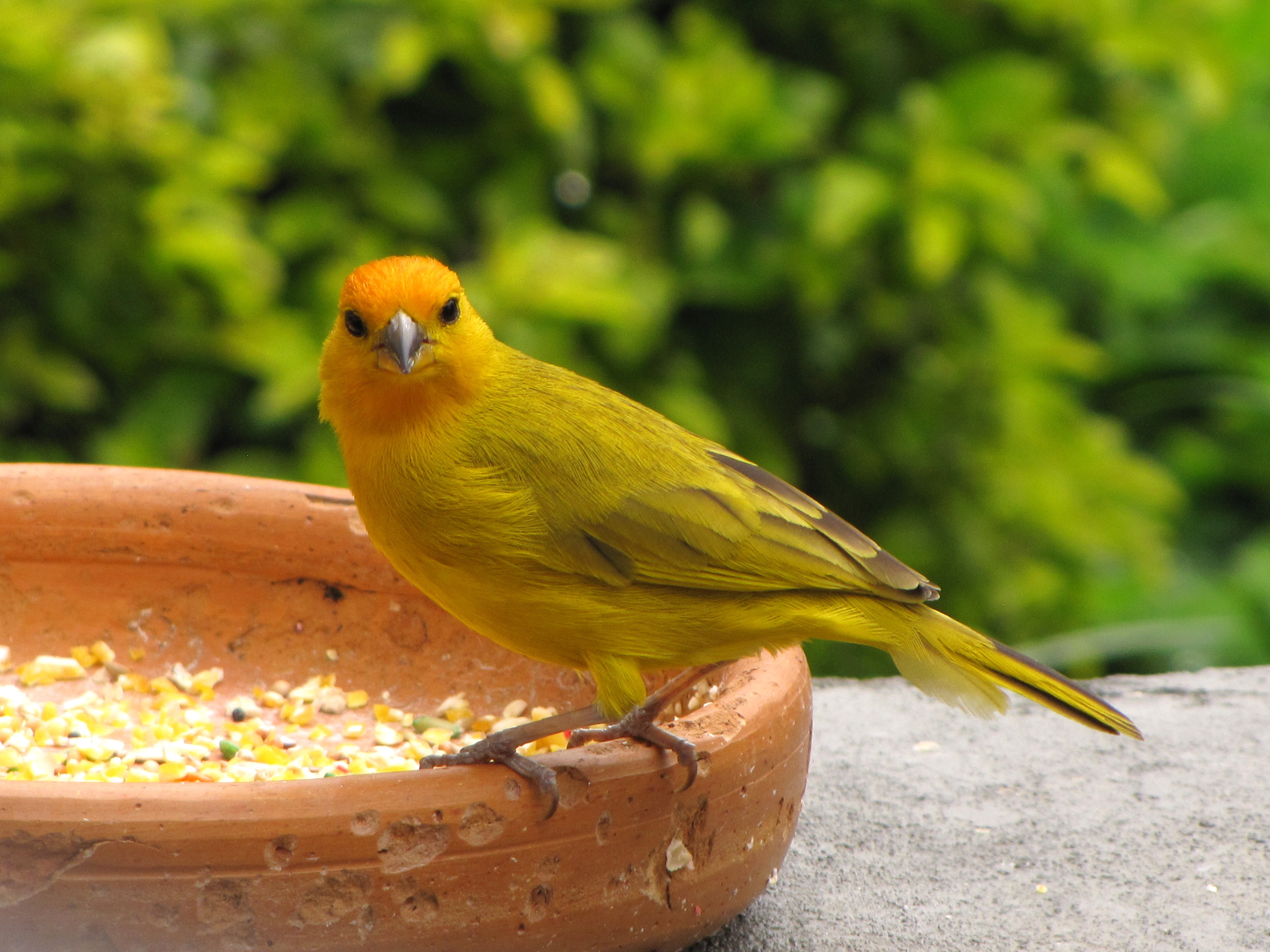 Sicalis flaveola (Canario coronado)